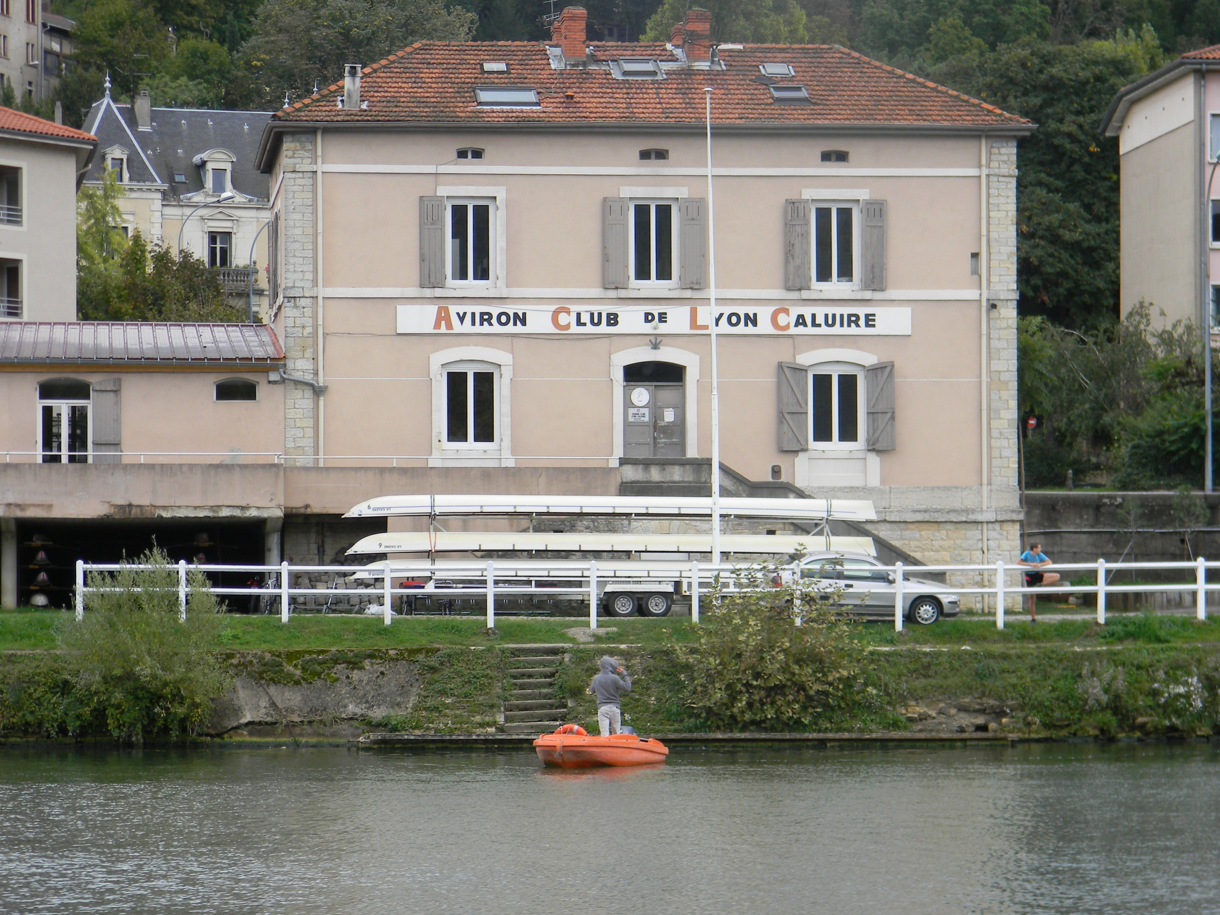 Aviron Club de Lyon Caluire